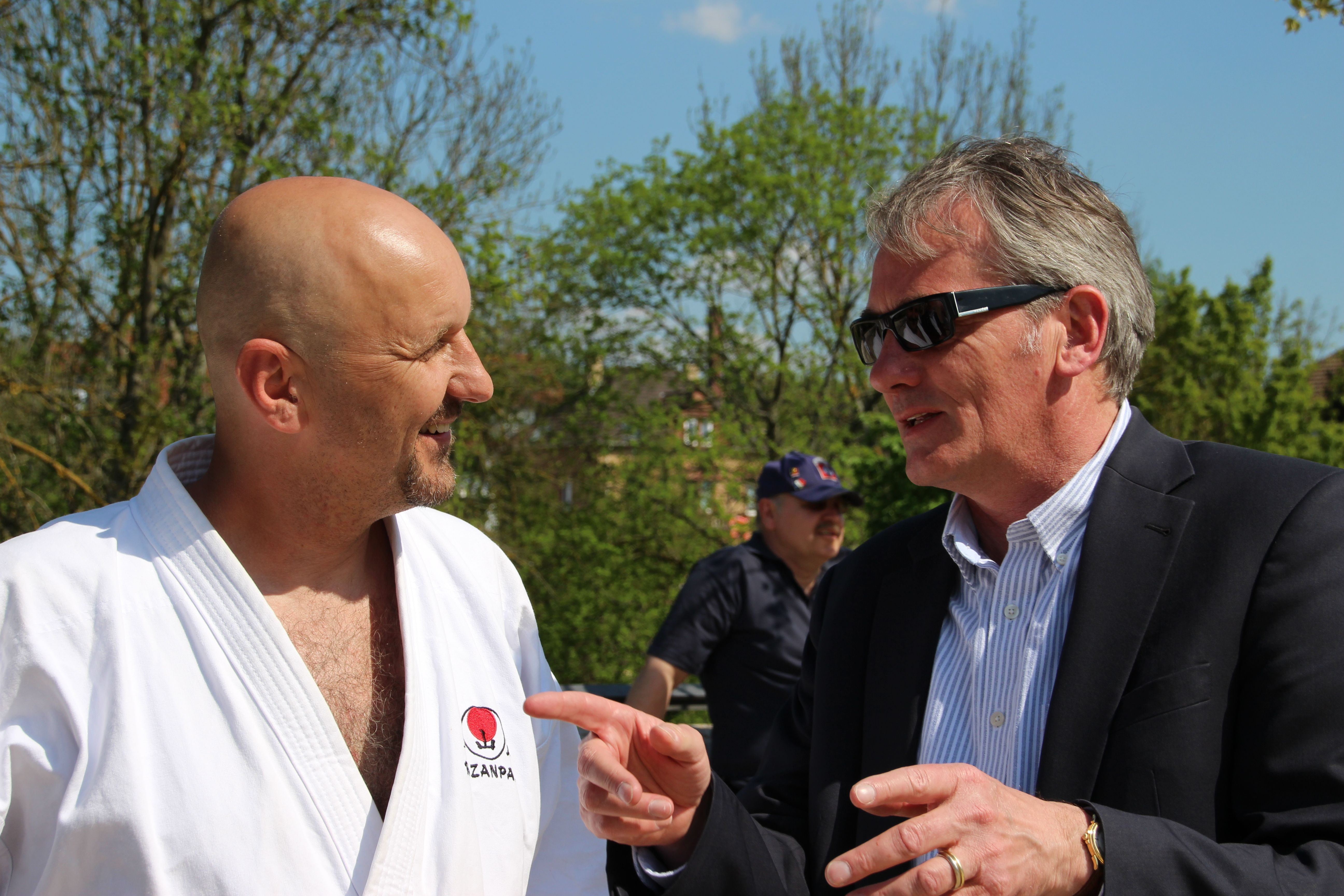 Mit dem „Kata-Spezial“ organisierte die Karateabteilung des TSV Tauberbischofsheim 2013 und 2016 die weltgrößte Karateveranstaltung in Tauberbischofsheim, bei der jeweils über 1000 Karateka, die Karate-Nationalmannschaft sowie hochrangige Karatemeister aus der ganzen Welt in Aktion waren. 2016 kam es dabei zu einem Weltrekordversuch: In den vier größten Hallen in Tauberbischofsheim, die Halle am Wört, die Grünewaldhalle, die Festhalle und die Fechterhalle sowie auf dem Wörthplatz fand der größte Karatelehrgang der Welt statt. Dabei wurde das Training dokumentiert und beim Guinness-Buch der Rekorde eingereicht. Auf dem Bild zu sehen: - Erhard Götzelmann ("Schlatt"), national und international gefragter Karatelehrer und Dolmetscher, Träger des 5. Dan (Schwarzgurt), Trainer der Karatedojos im TSV Tauberbischofsheim und des TV Wertheim, Fachbuchautor und Verleger (für Karate-, Budo- und Kampfsportliteratur). - Wolfgang Vockel, Bürgermeister der Stadt Tauberbischofsheim